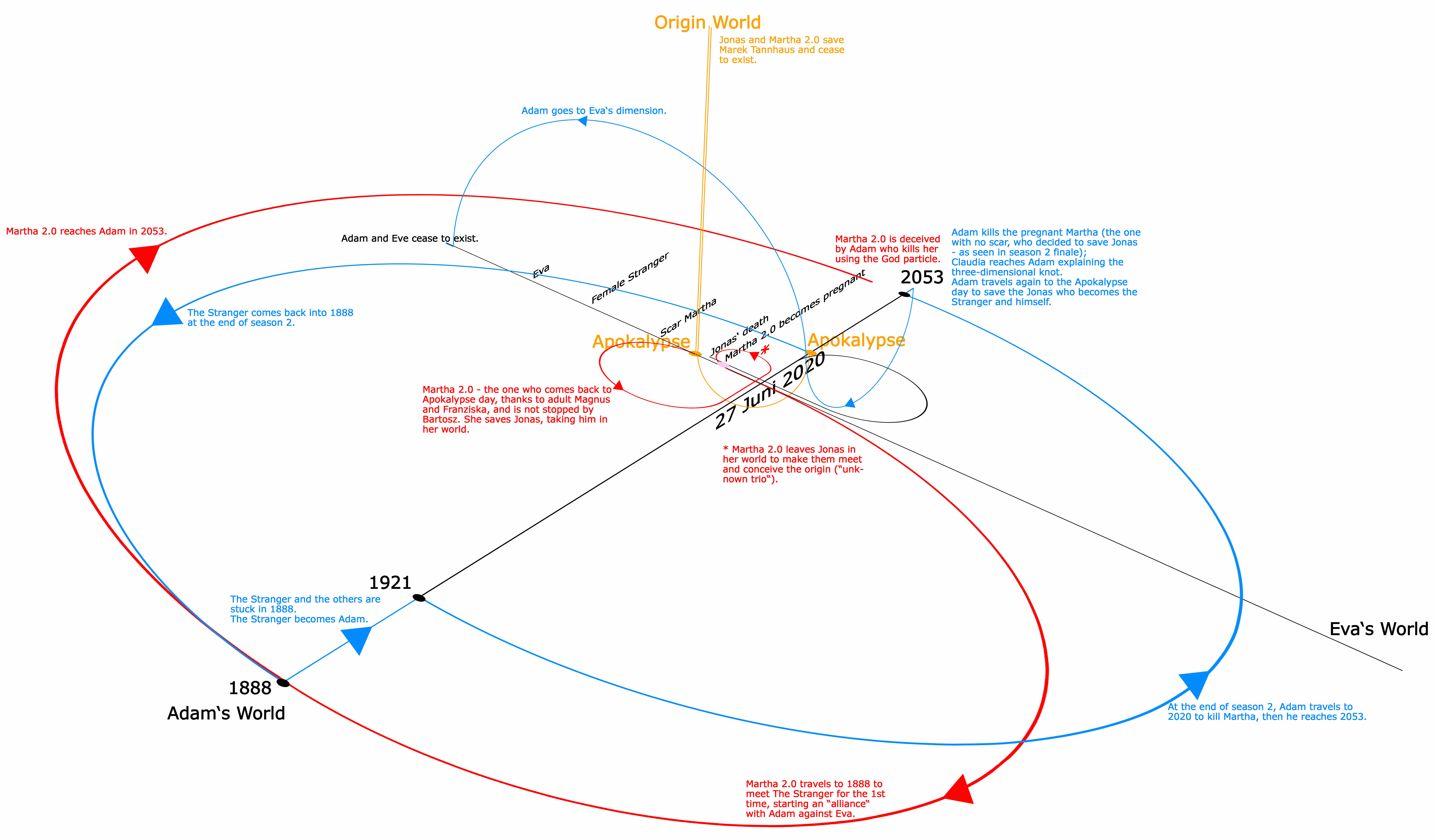 Logica delle linee temporali e degli spostamenti nel primo ed ultimo episodio della terza stagione di Dark.